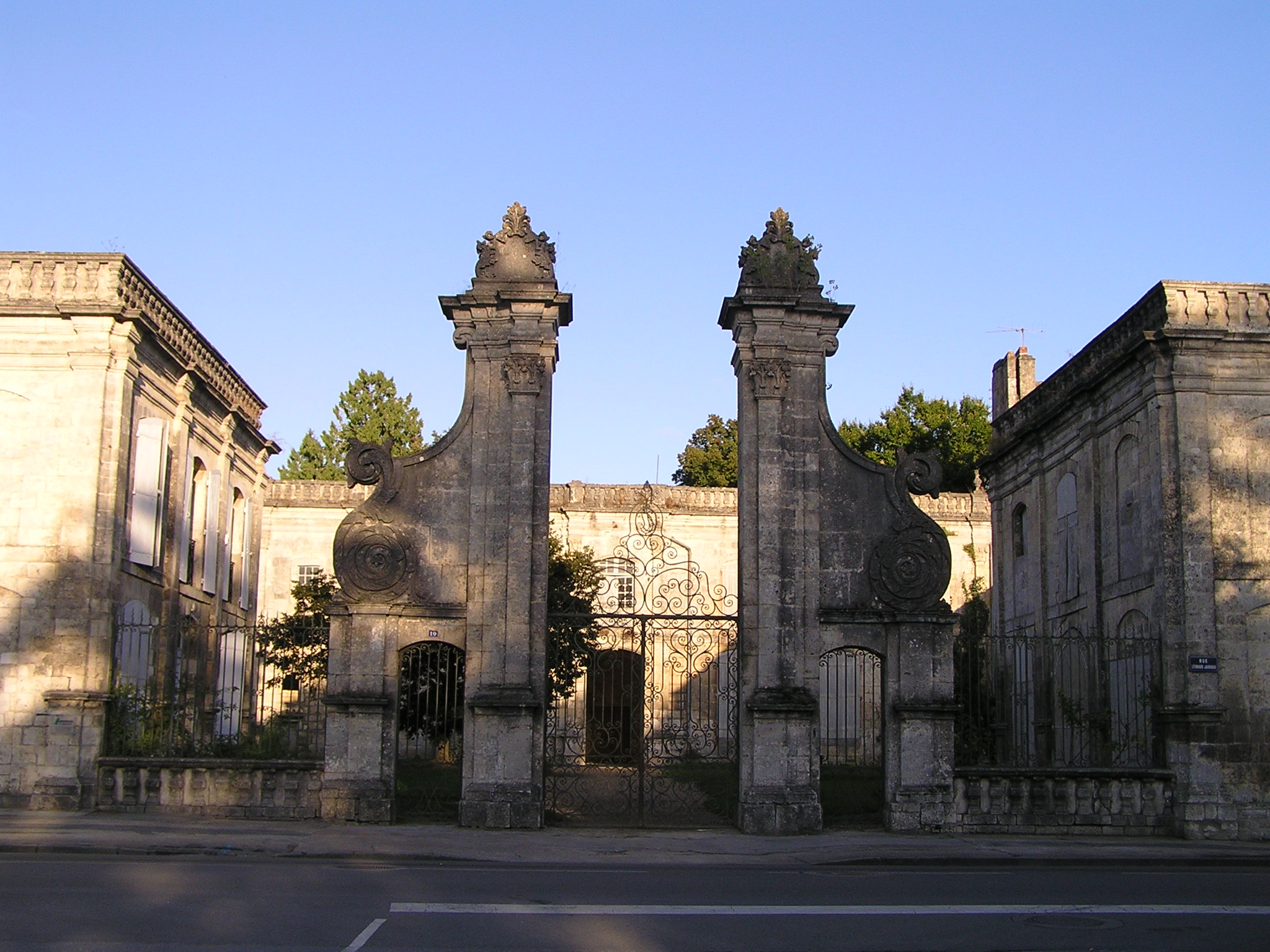 abbaye Notre-Dame de La Couronne (Charente)